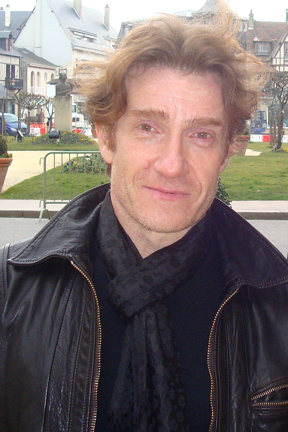 L'acteur français Thierry Frémont à Deauville en 2010.